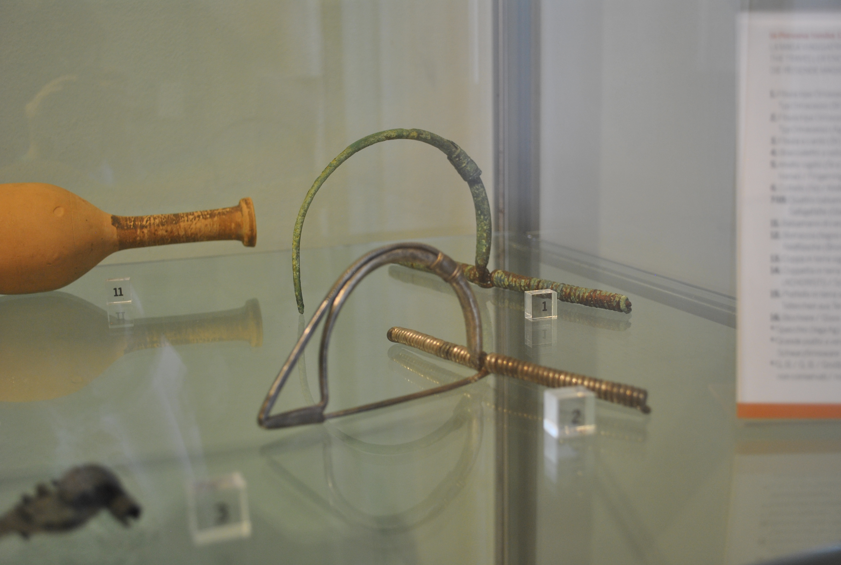 La caratteristica fibula di Ornavasso, ritrovata nella vicina necropoli e custodita nel locale Museo di Ornavasso